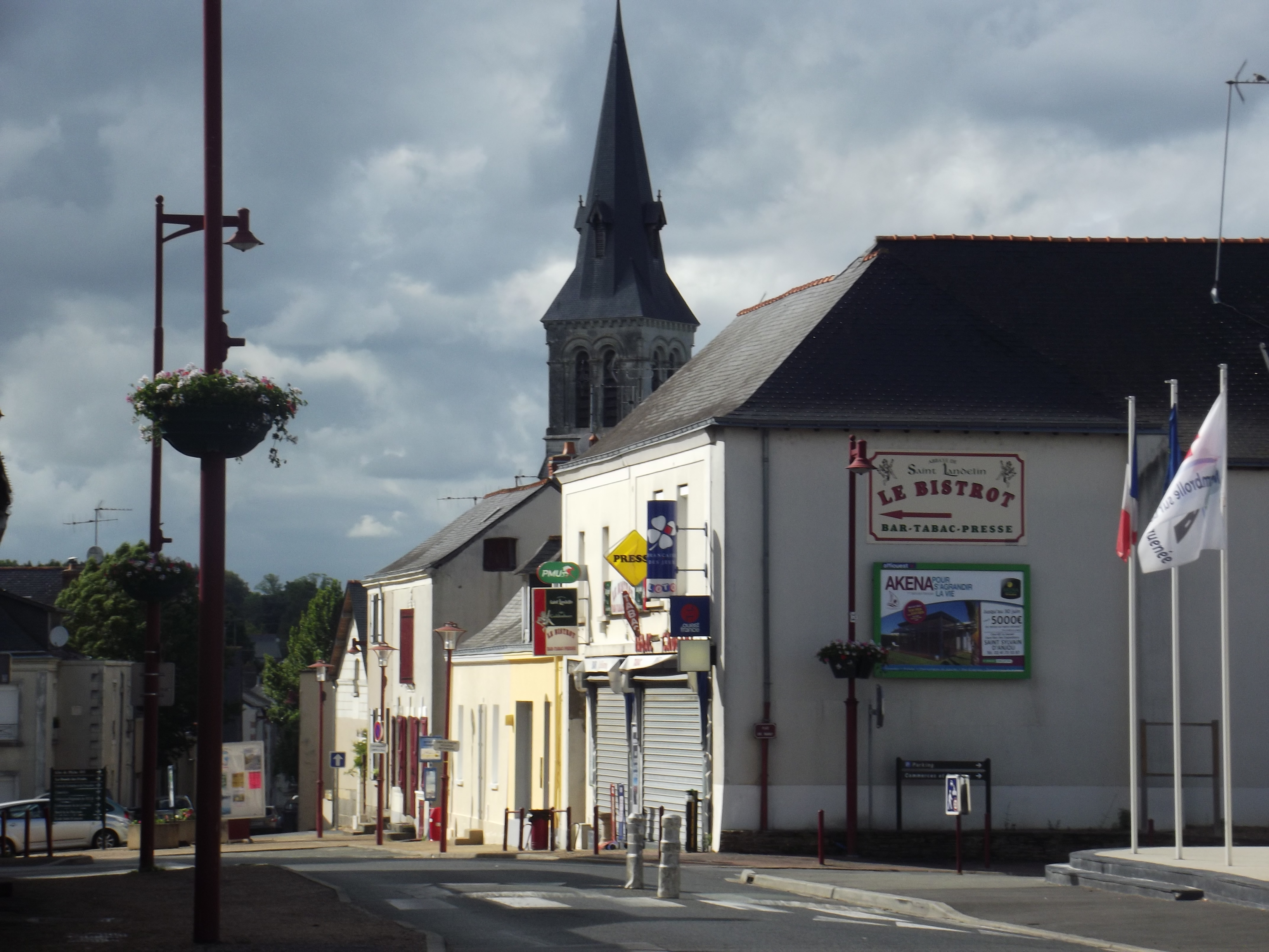 Le centre-bourg, un dimanche, de La Membrolle-sur-Longuenée (Maine-et-Loire), France